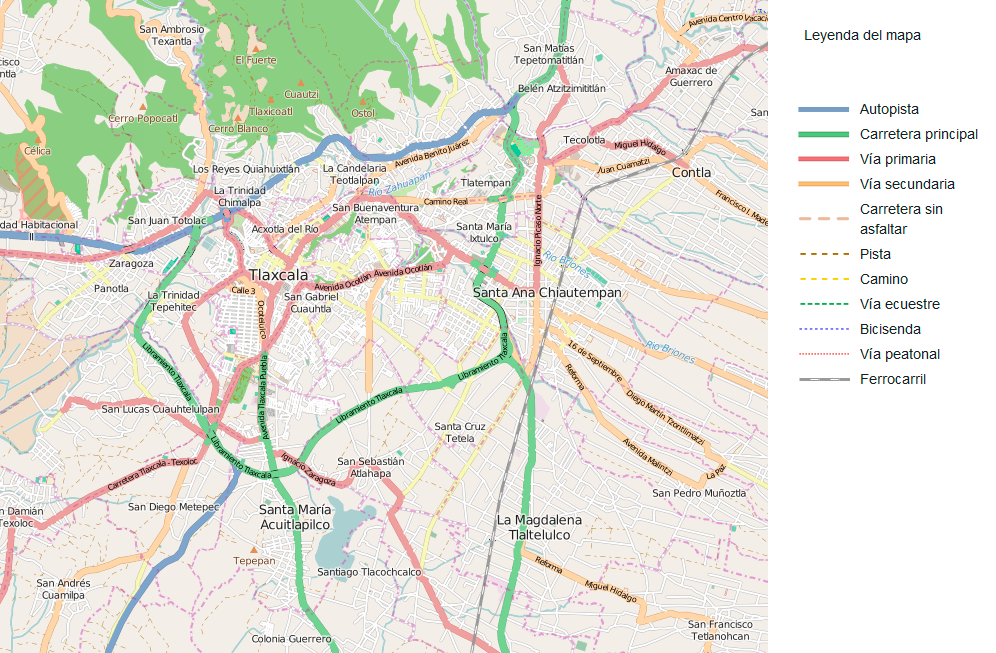 Vialidades